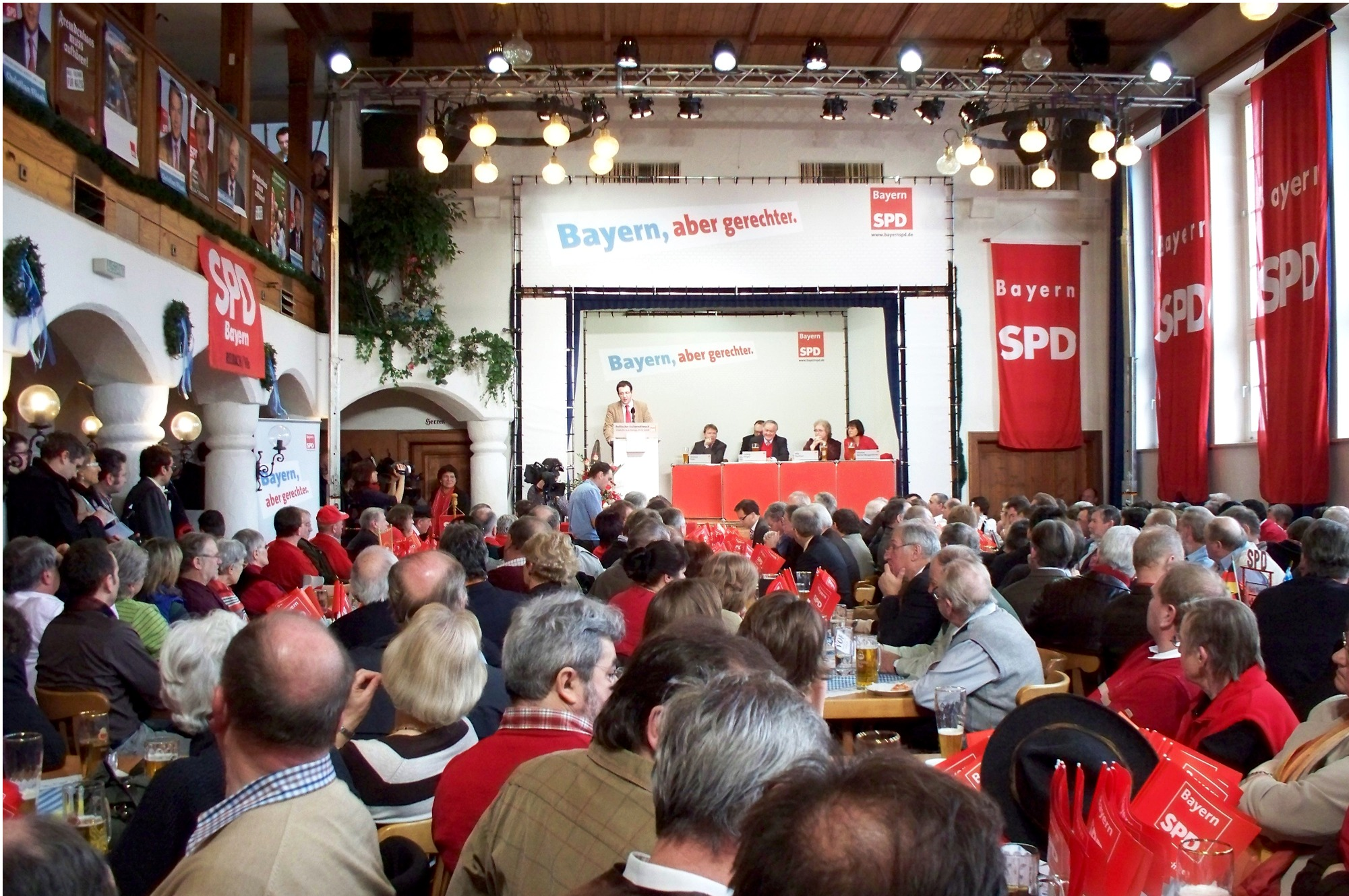 Der politische Aschermittwoch der SPD im Wolferstetter Keller in Vilshofen im Jahr 2009. Der Sprecher ist Florian Gams.